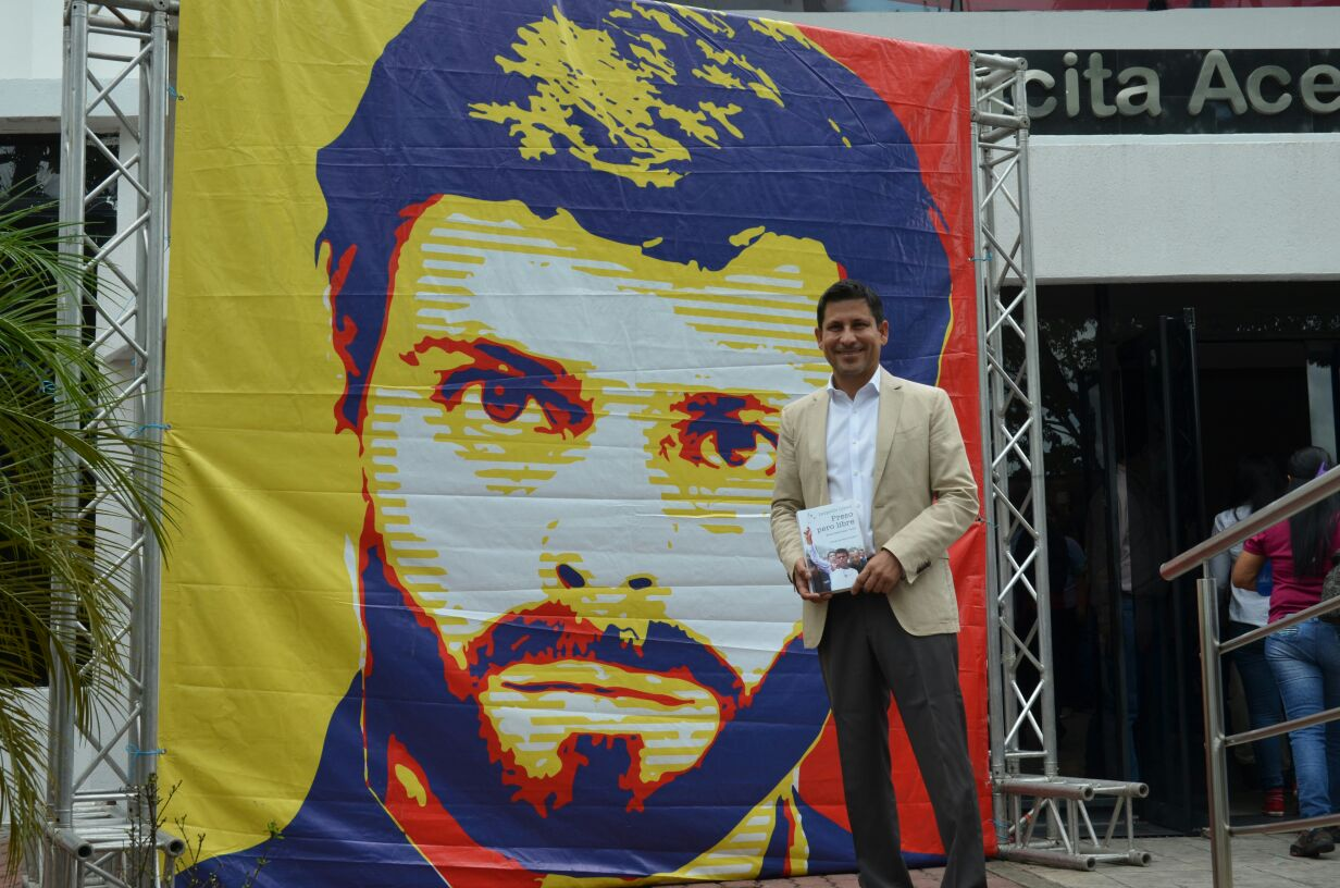 Warner Jiménez el 25 de Agosto de 2016, en la presentación del libro de Leopoldo López "Preso Pero Libre", el mismo día en el que le dictaron orden de aprehensión.